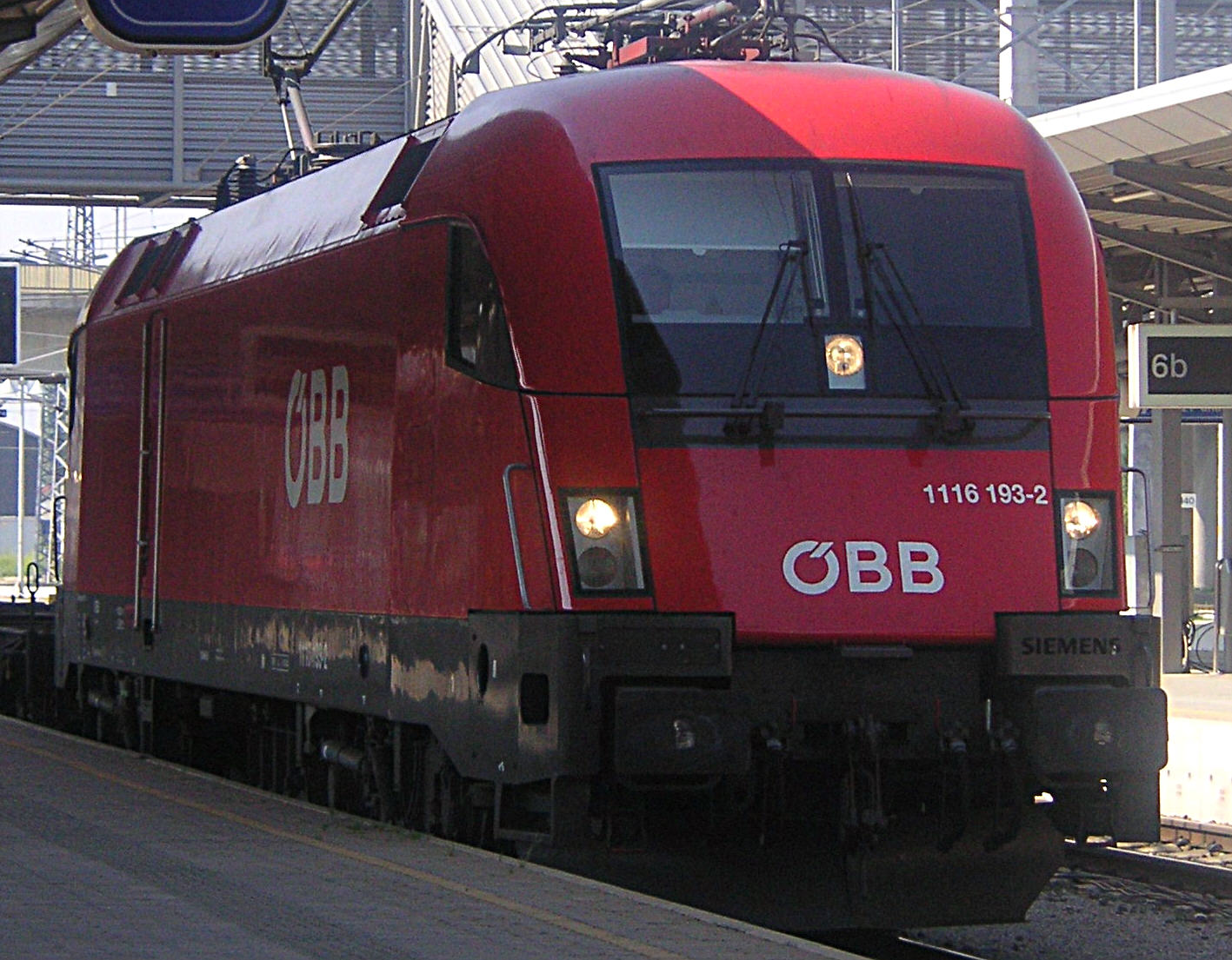 de: ÖBB 1116 193-2 "Taurus" in Wiener Neustadt Hbf en: ÖBB 1116 193-2 "Taurus" in Wiener Neustadt Hbf (main station), Austria